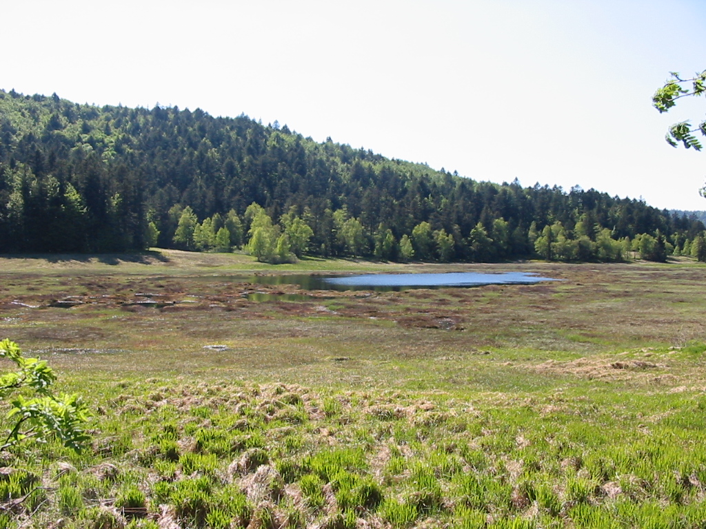 Étang de Machais : tourbière protégée. Commune de La Bresse (88250), France Photographie personnelle prise le 8 juin 2006. Copyright © Christian Amet